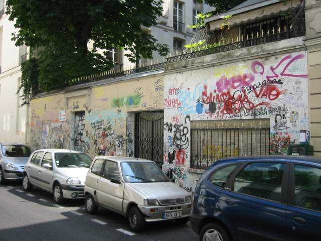 Das Haus von Serge Gainsbourg in der rue de Verneuil im Pariser Stadtteil Saint Germain des Prés. Es wurde von seiner Tochter und Erbin, Charlotte Gainsbourg, im Originalzustand erhalten. Maison de Serge Gainsbourg de la rue de Verneuil à Saint Germain des Prés à Paris, conservée en l'état par son héritière, Charlotte Gainsbourg. PHOTOS de l'intérieur de l'appartement